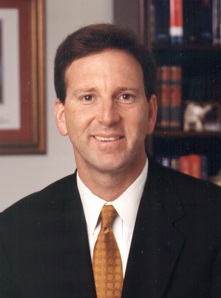 Tony Garza, U.S. Ambassador to Mexico.